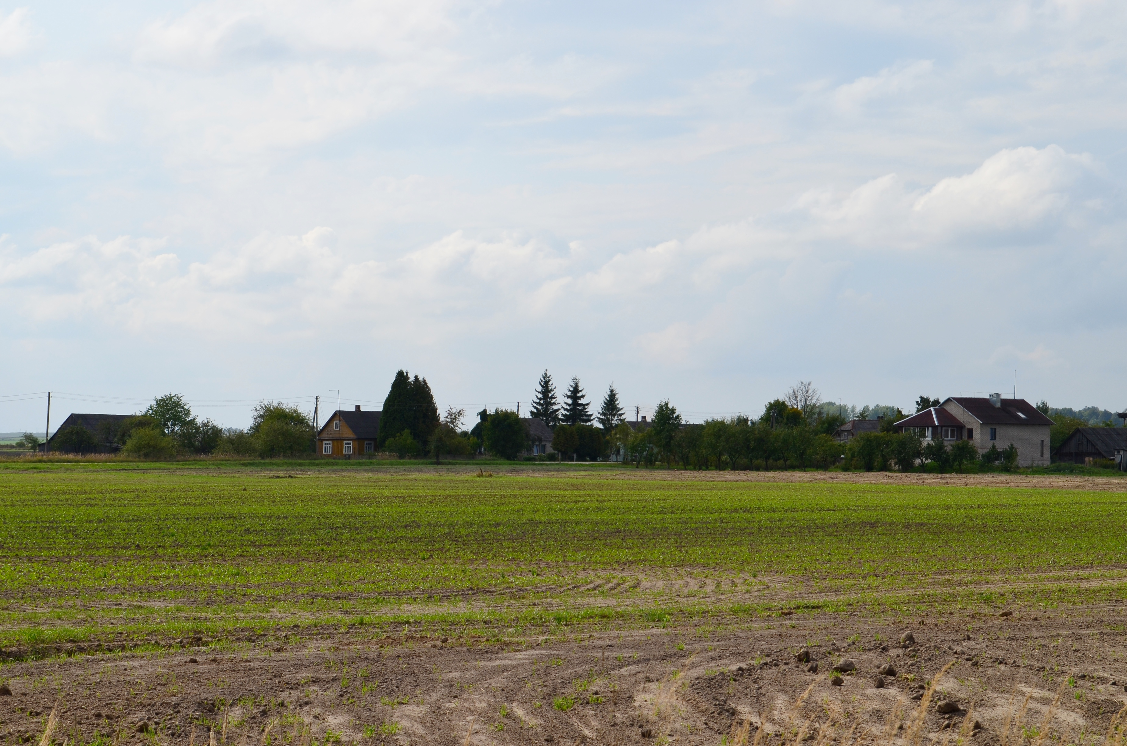 Meironiškėliai, Kėdainių raj.